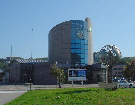 Muroran Station, Muroran, Hokkaido, Japan 室蘭本線ja:室蘭駅駅舎（北海道室蘭市）